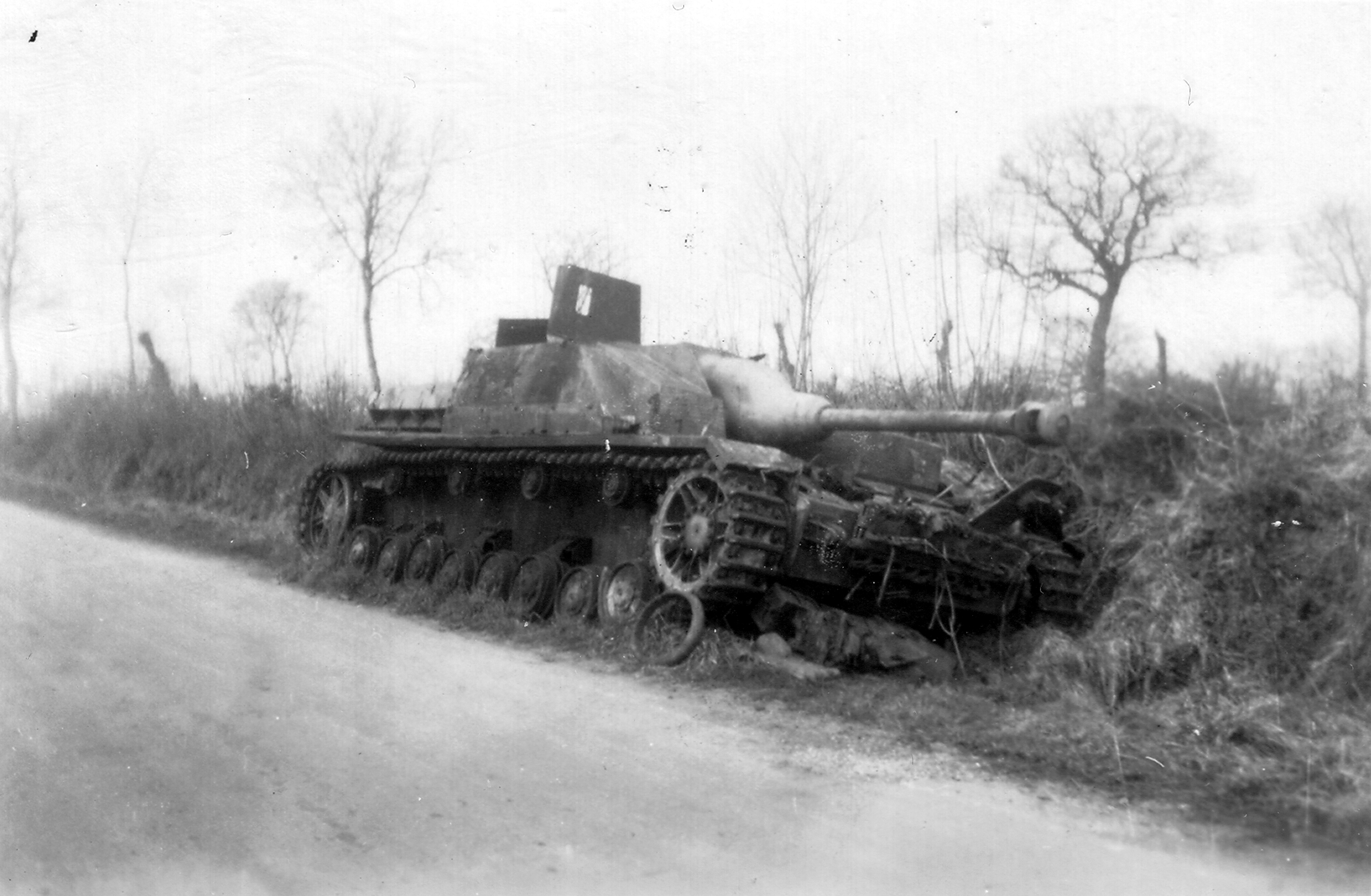 Photographie allemande - Occupation de la Normandie : Crash de véhicules divers (col. Normandie Mémoire).